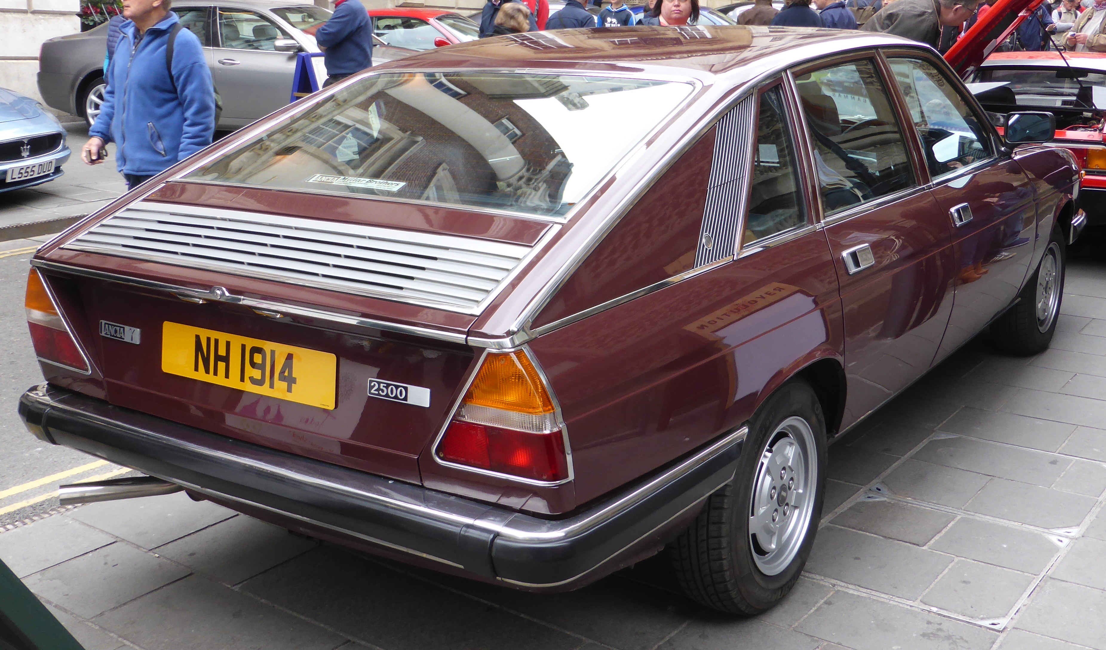 Bristol Italian AutoMoto Festival